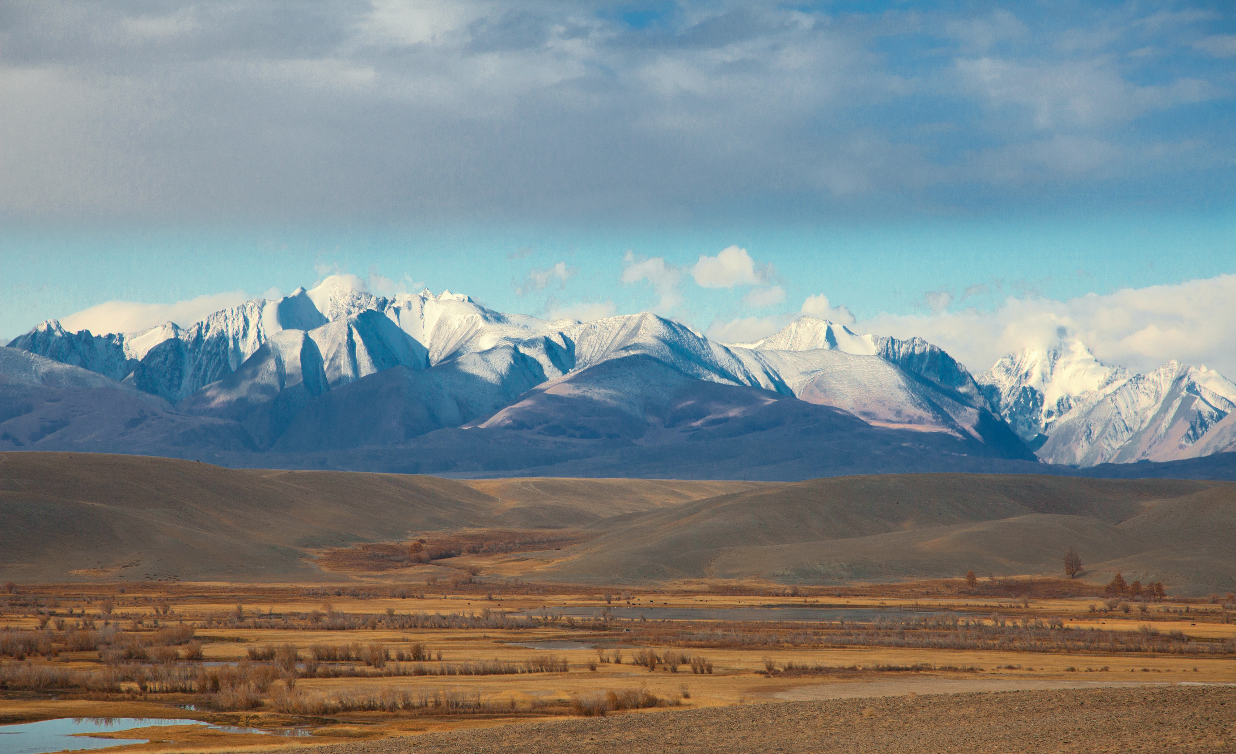 Курайская степь